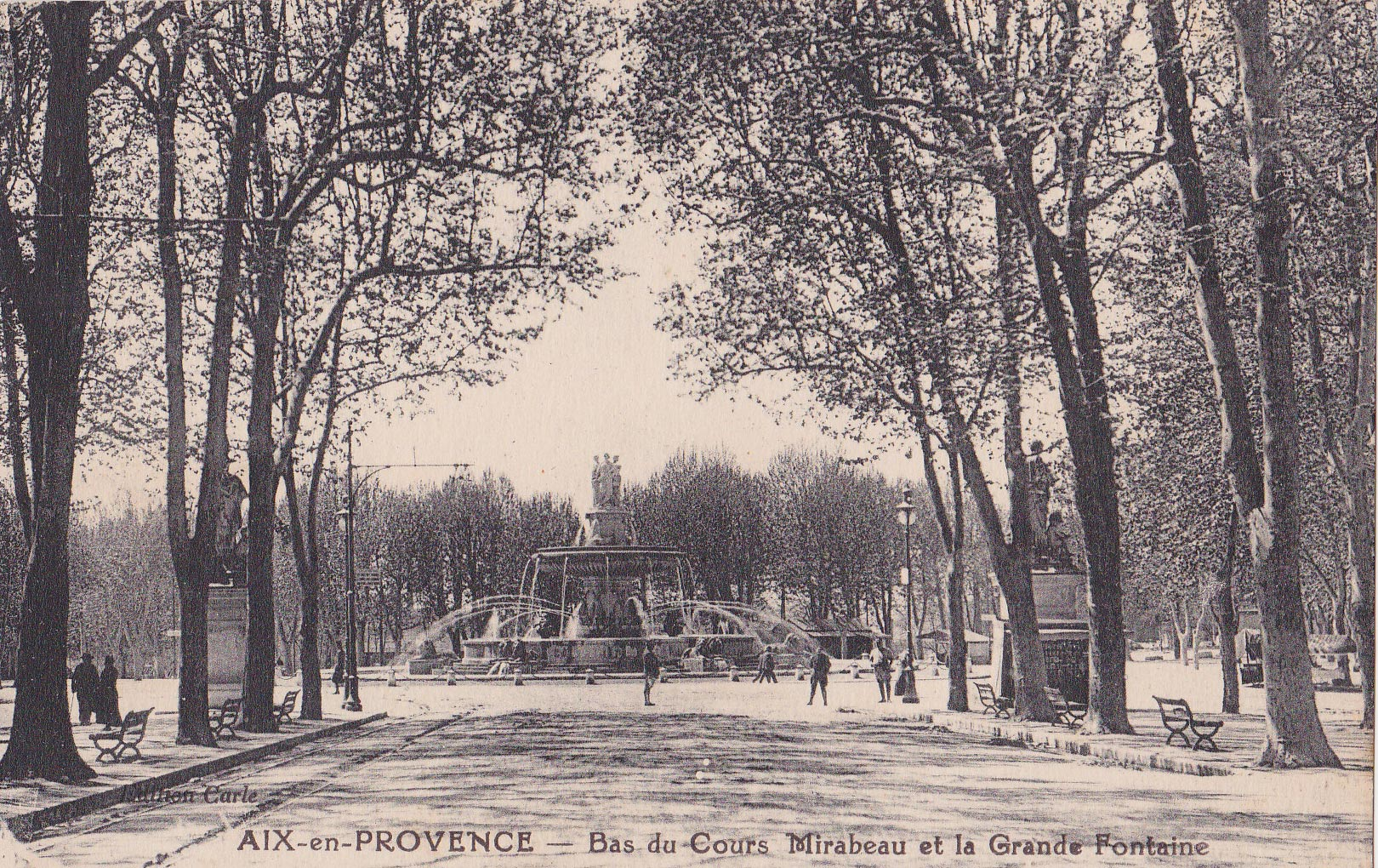 Bas du cours Mirabeau vers 1910.